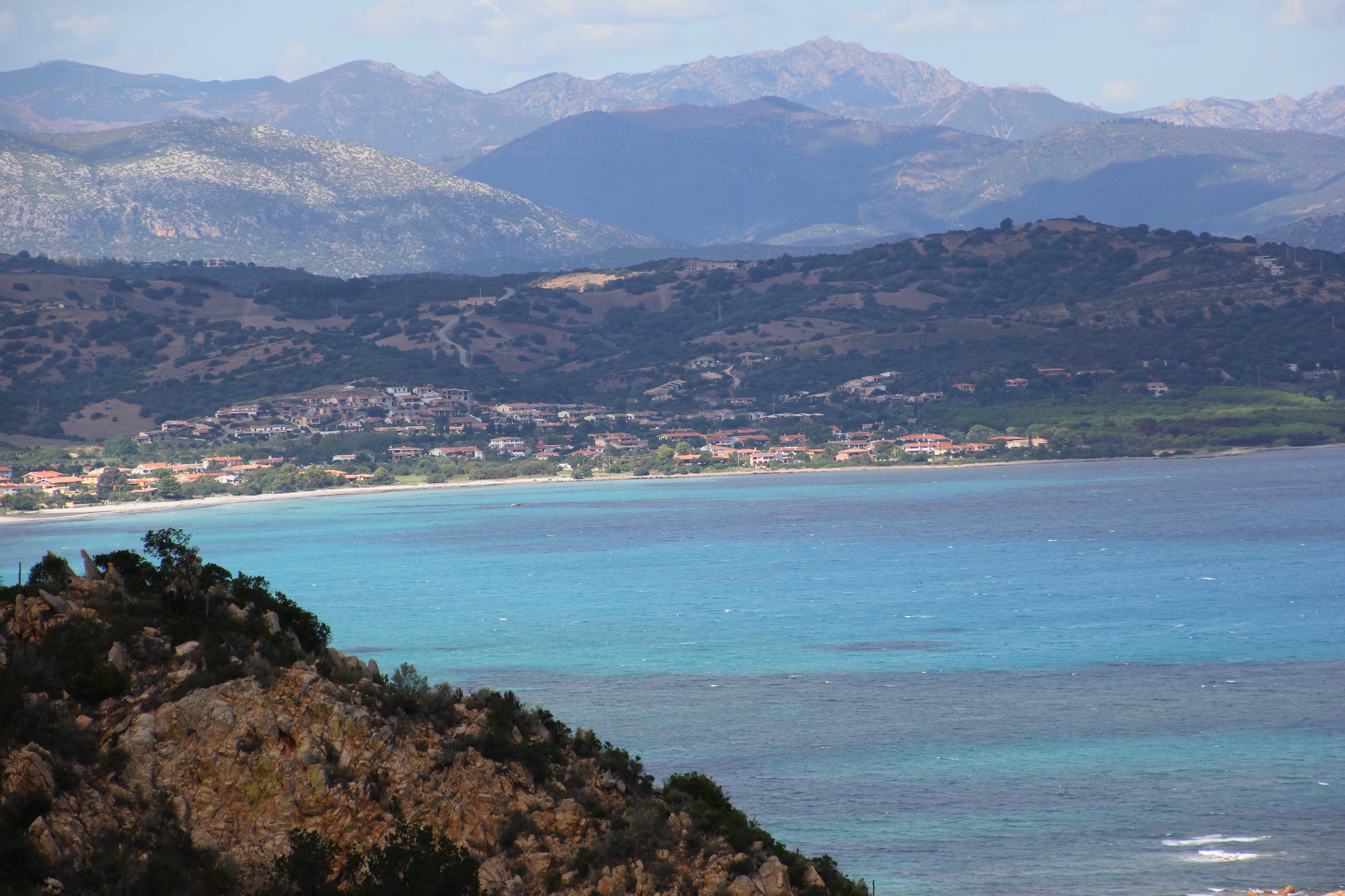 Siniscola - Sa Pedra Ruia